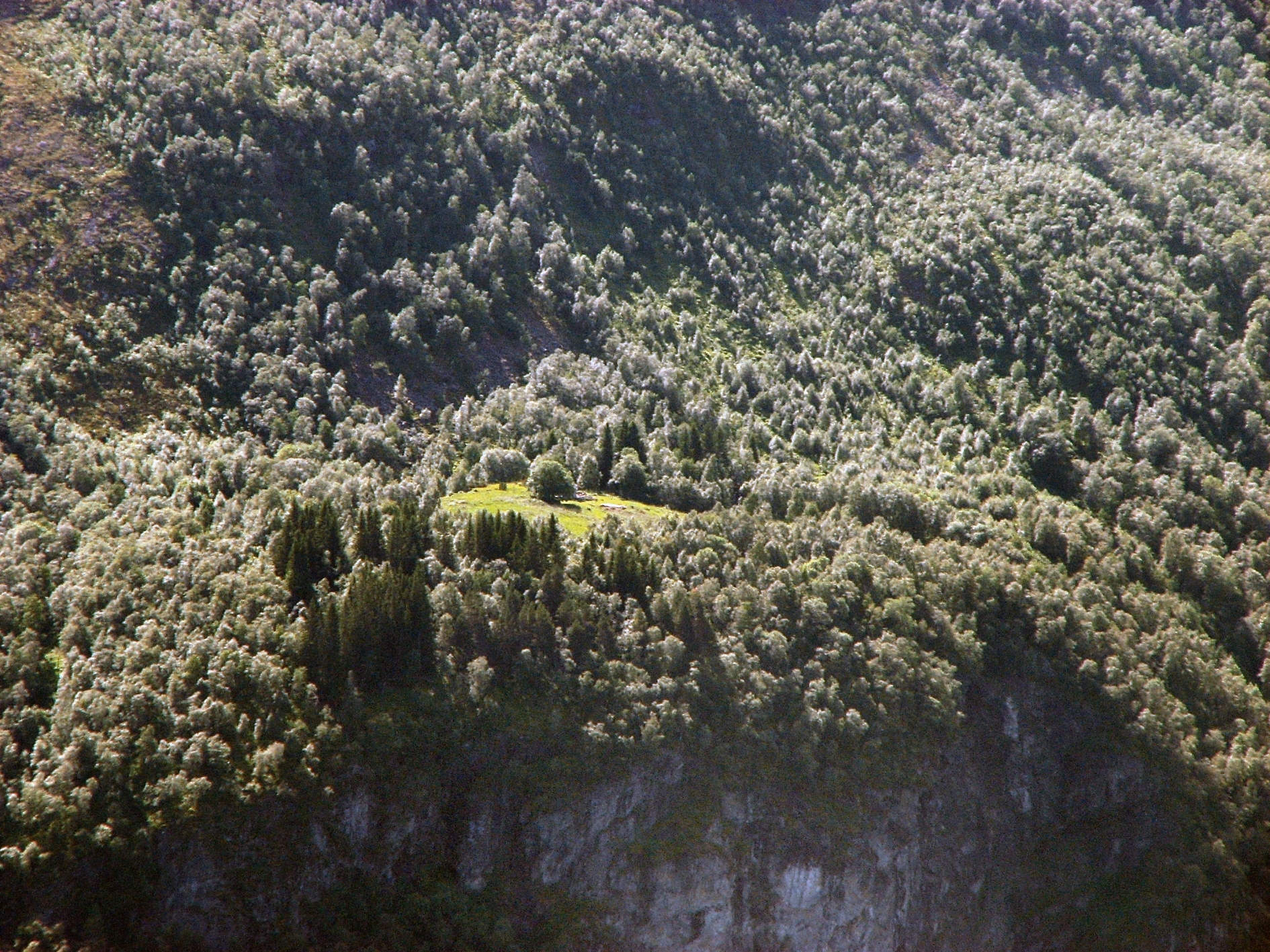 Tunet på øydegarden Furnes ved Sunnylvsfjorden, teke frå Åkerneset (2008).